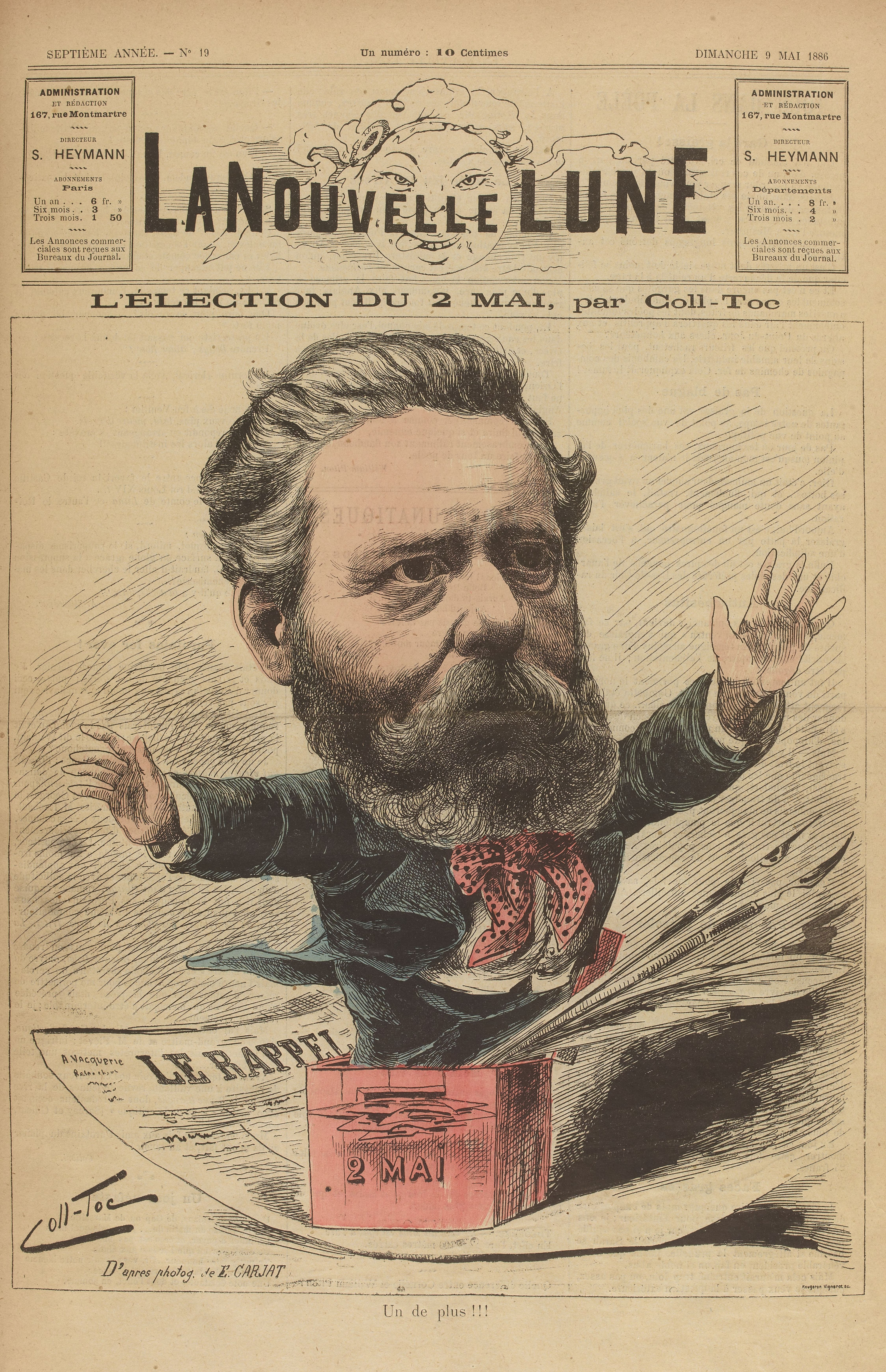 "L'élection du 2 mai, par Coll-Toc".